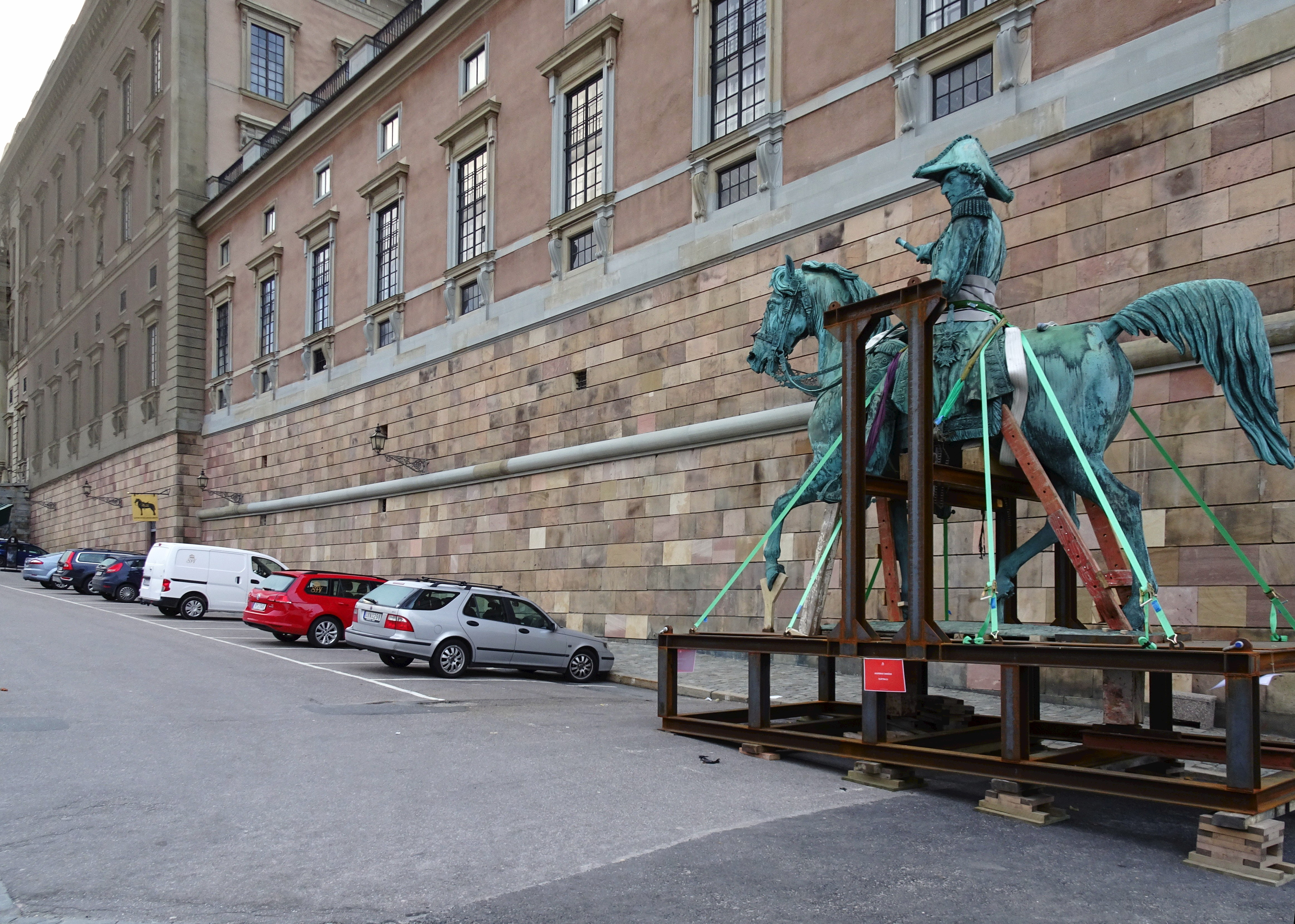 Karl XIV Johans staty på Gubbens torg, Slottsbacken